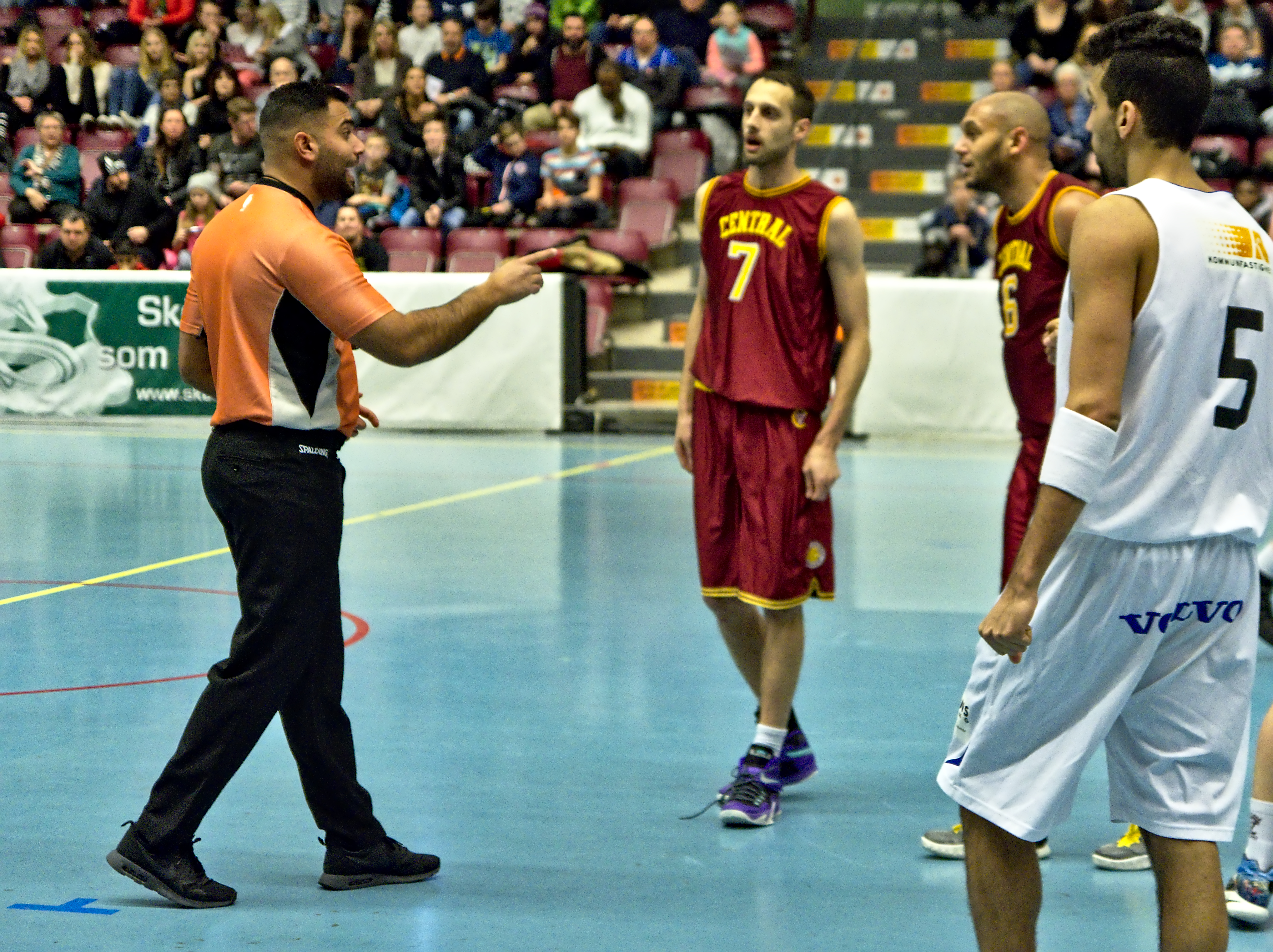 Eskilstuna Basket-KFUM Central, 2016-03-05 i Eskilstuna sporthall. Match i Basketettans fortsättningsserie Superettan.